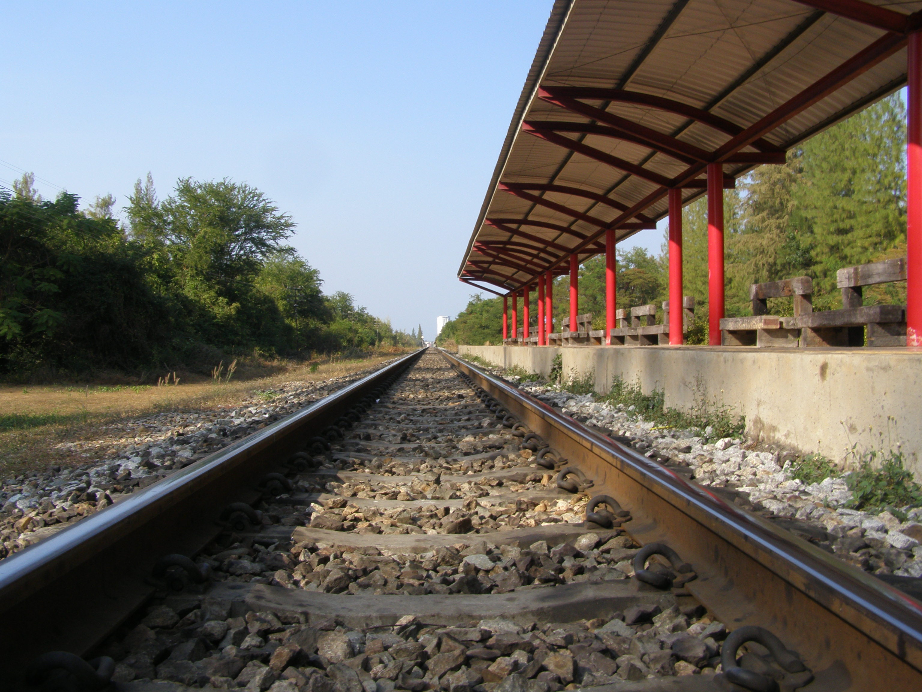 สถานีรถไฟสวนสนประดิพัทธ์